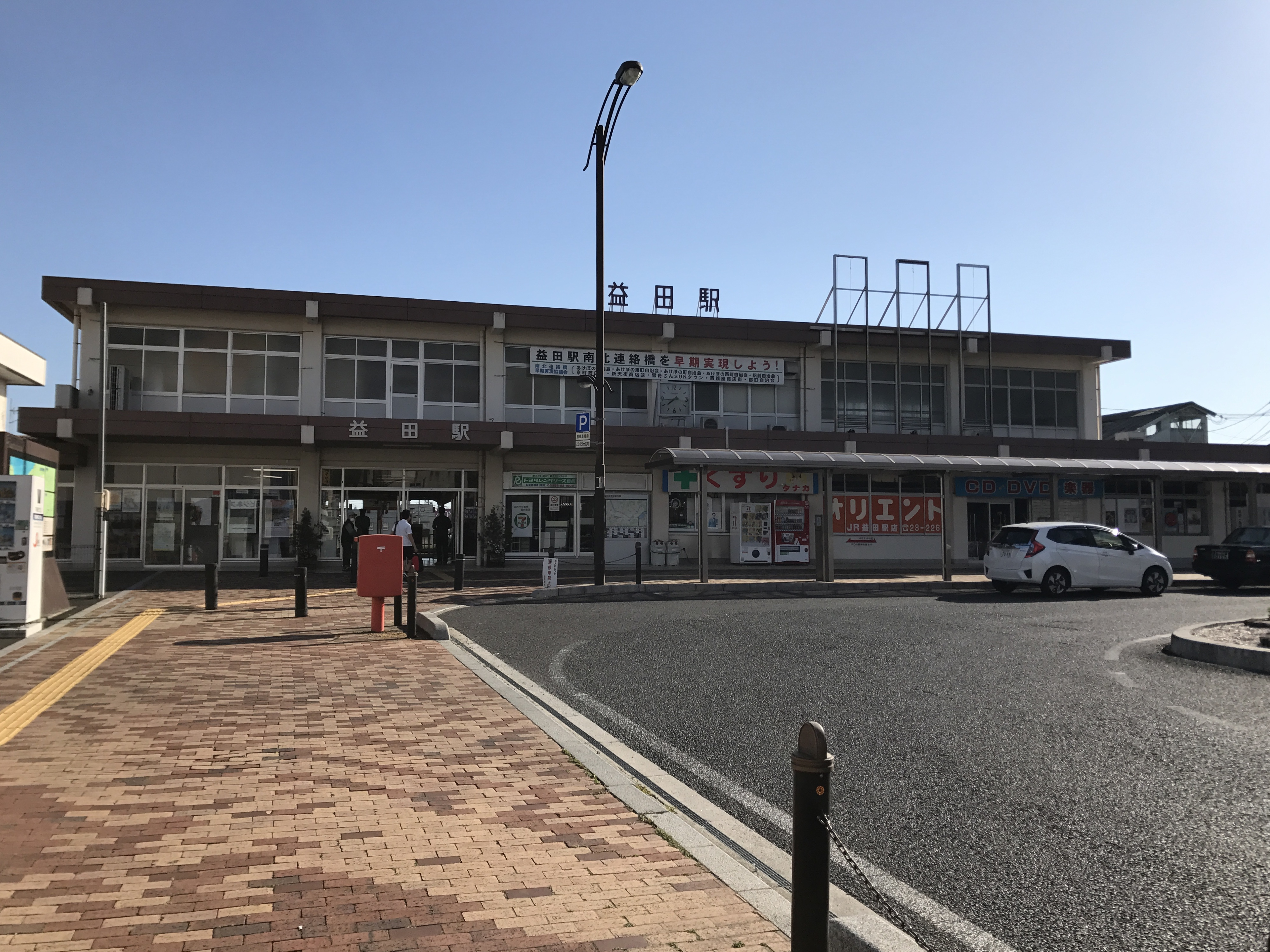 益田駅駅舎